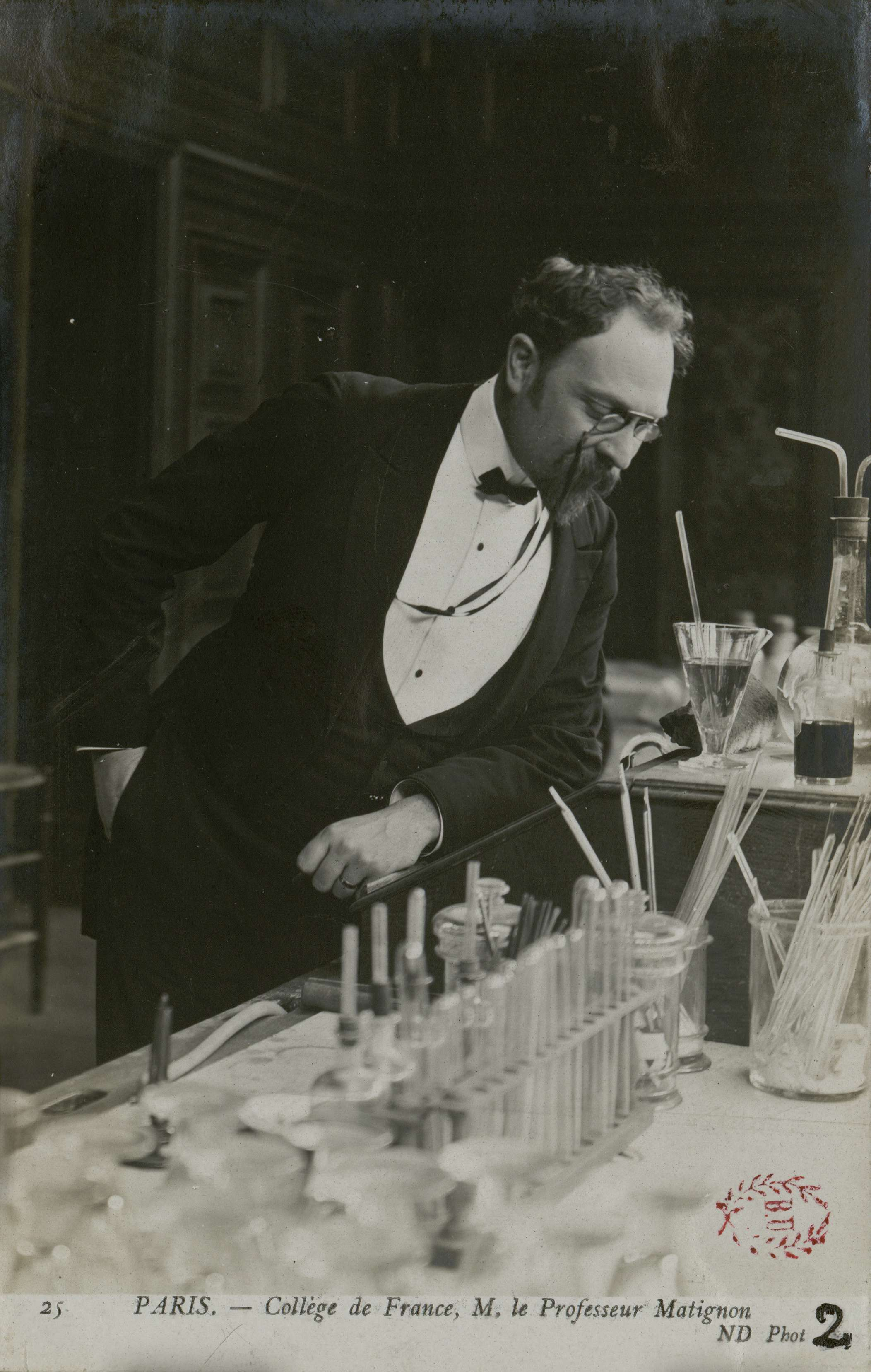 Carte postale photographique